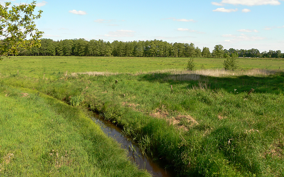 Ostenholzer Moor Ostenholz Moor, Lower Saxony, Germany.